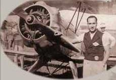 אלכסנדרו פאפאנהRomână: Alexandru Papană